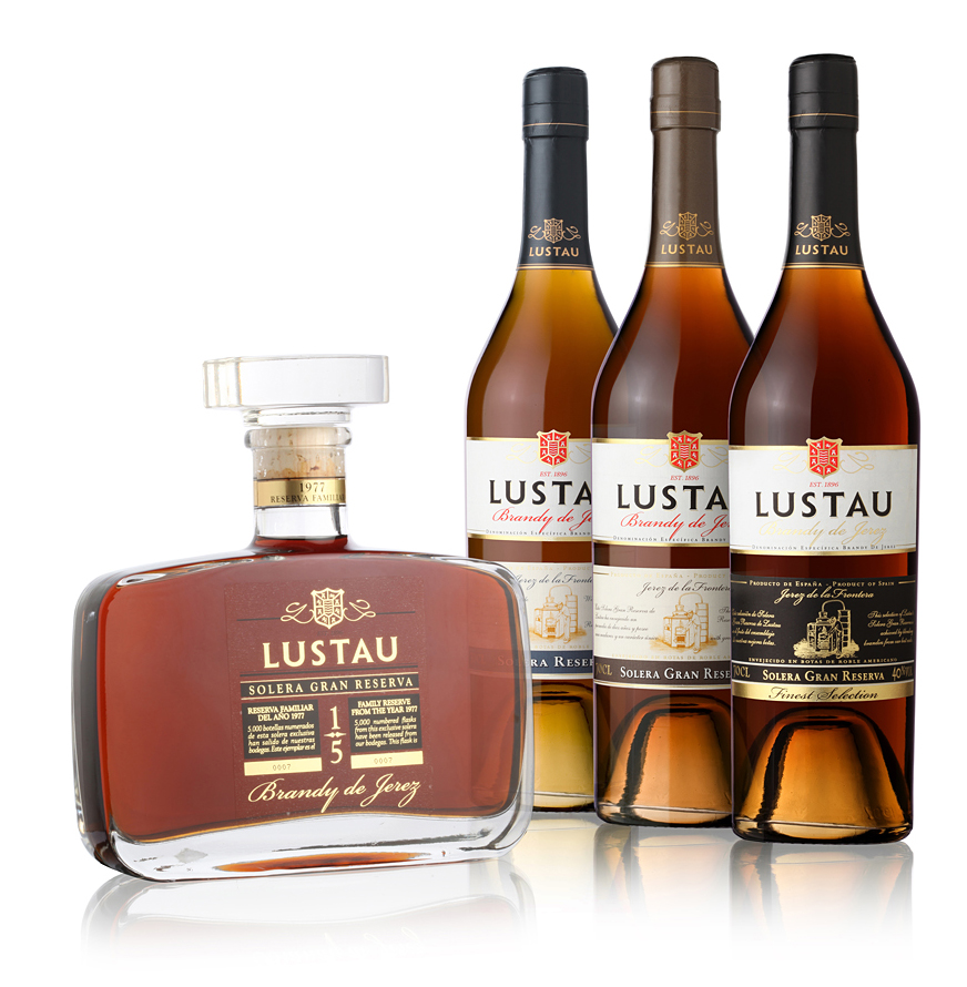 Bodegas Lustau posee una gama de Brandy de Jerez formada por cuatro excepcionales Brandis que han recibido los principales y más importantes premios internacionales en los últimos años.